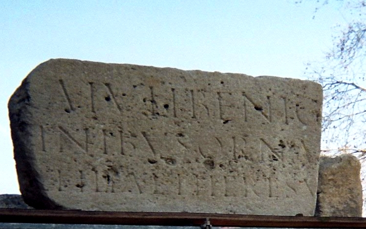 partie d'un bloc romain gravé. Tors, II° siècle